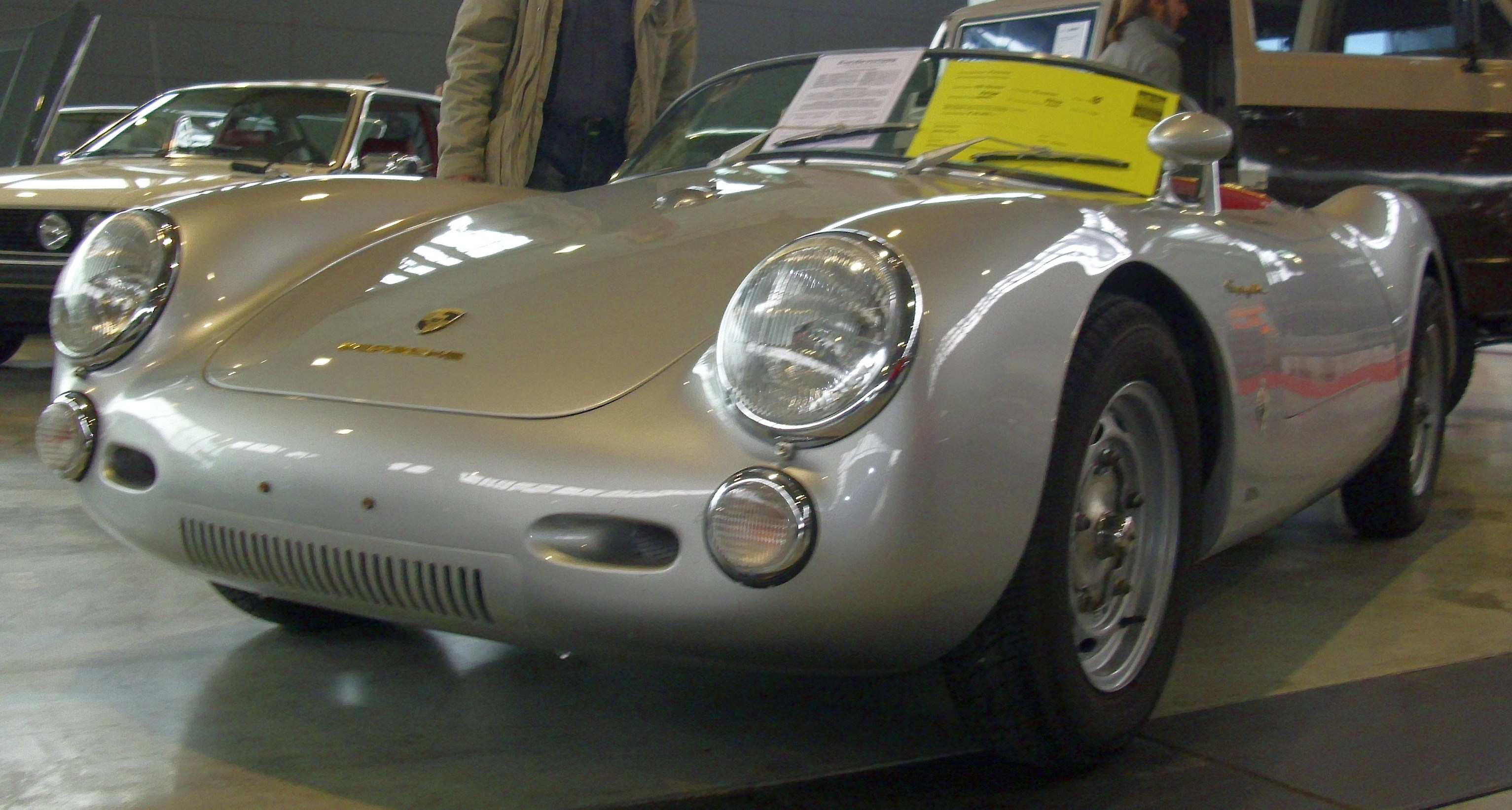 Chamonix von 1991